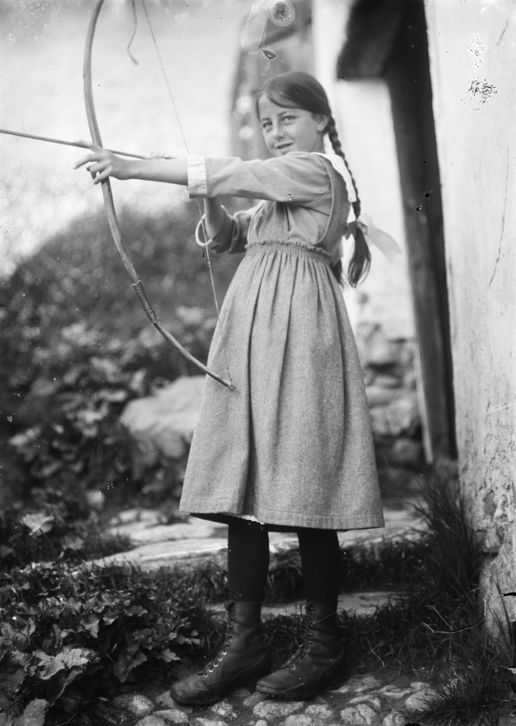 Fotografie von Ernst Ludwig Kirchner, die ein Bauernmädchen mit Pfeil und Bogen zeigt. Entstanden entweder 1919 oder 1923 vor dem "Haus in den Lärchen", oberhalb von Davos - Frauenkirch